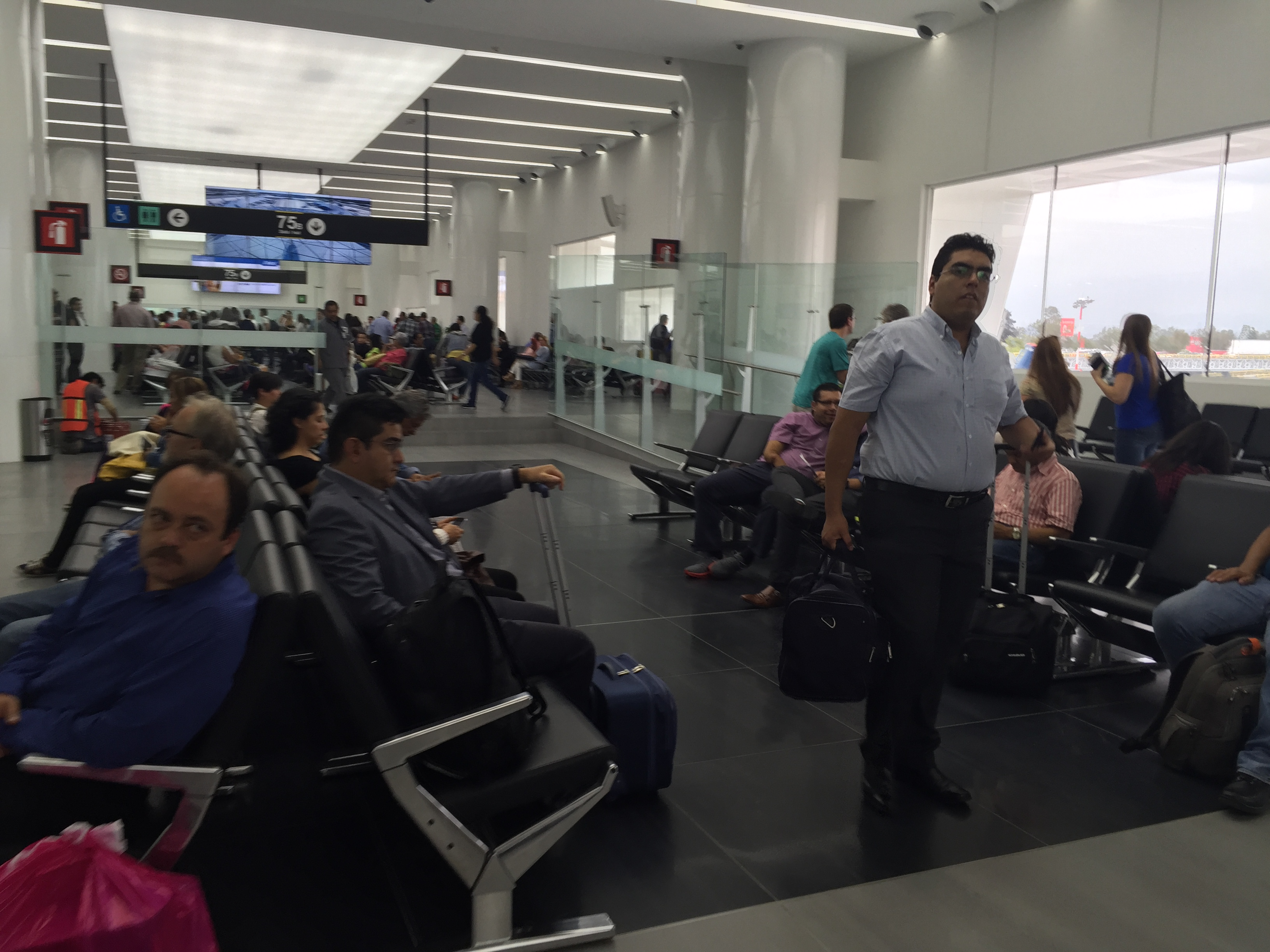 Nueva Sala 75 de la Terminal 2 del Aeropuerto Internacional de la Ciudad de México.